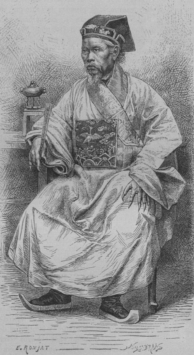 Mandarin annamite inférieur